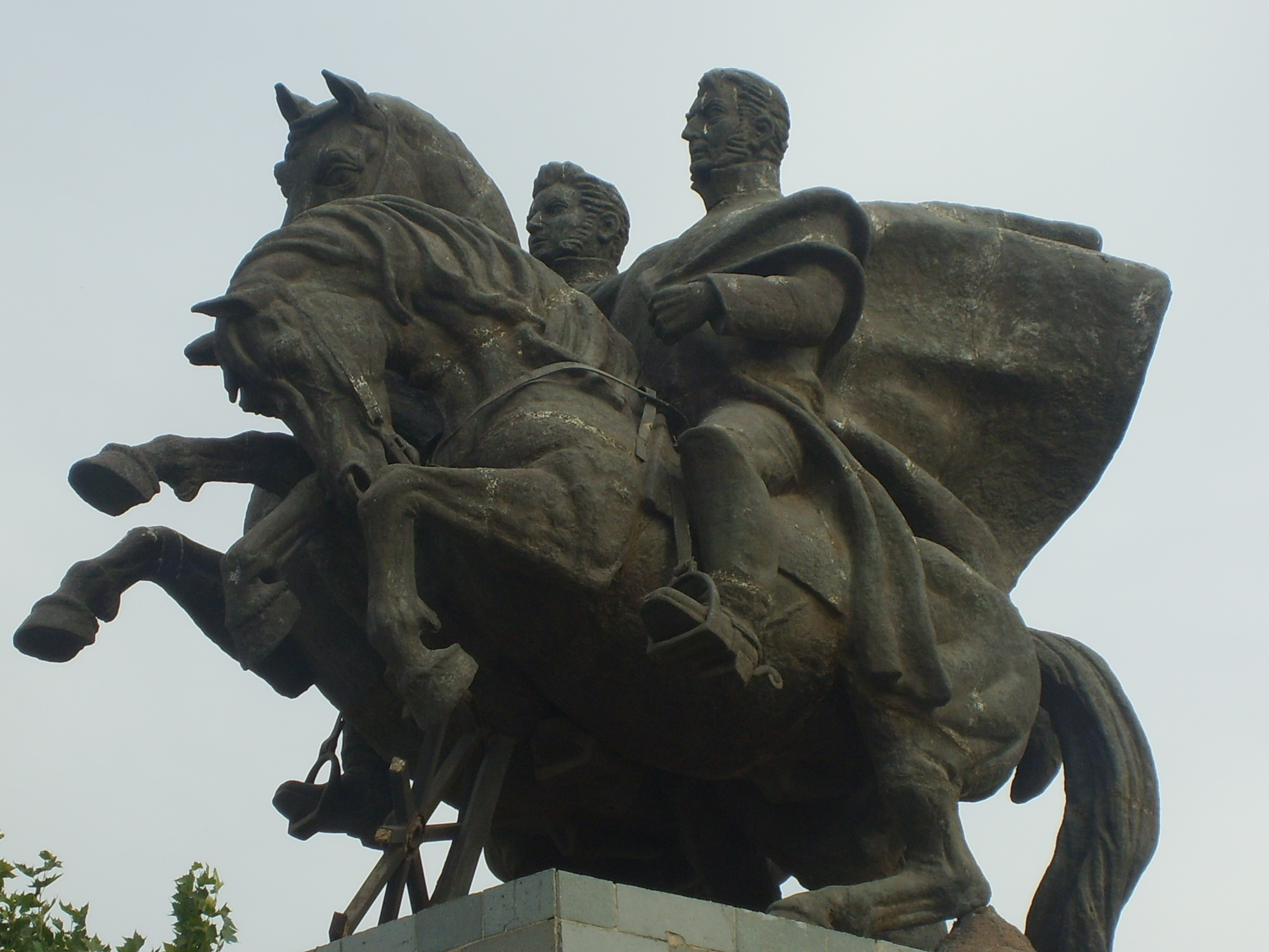 Monumento a los proceres José de San Martín y Bernardo O'Higgins en las afueras del Templo Votivo de Maipú. Foto obtenida por el Usuario Valo en Maipú, Chile